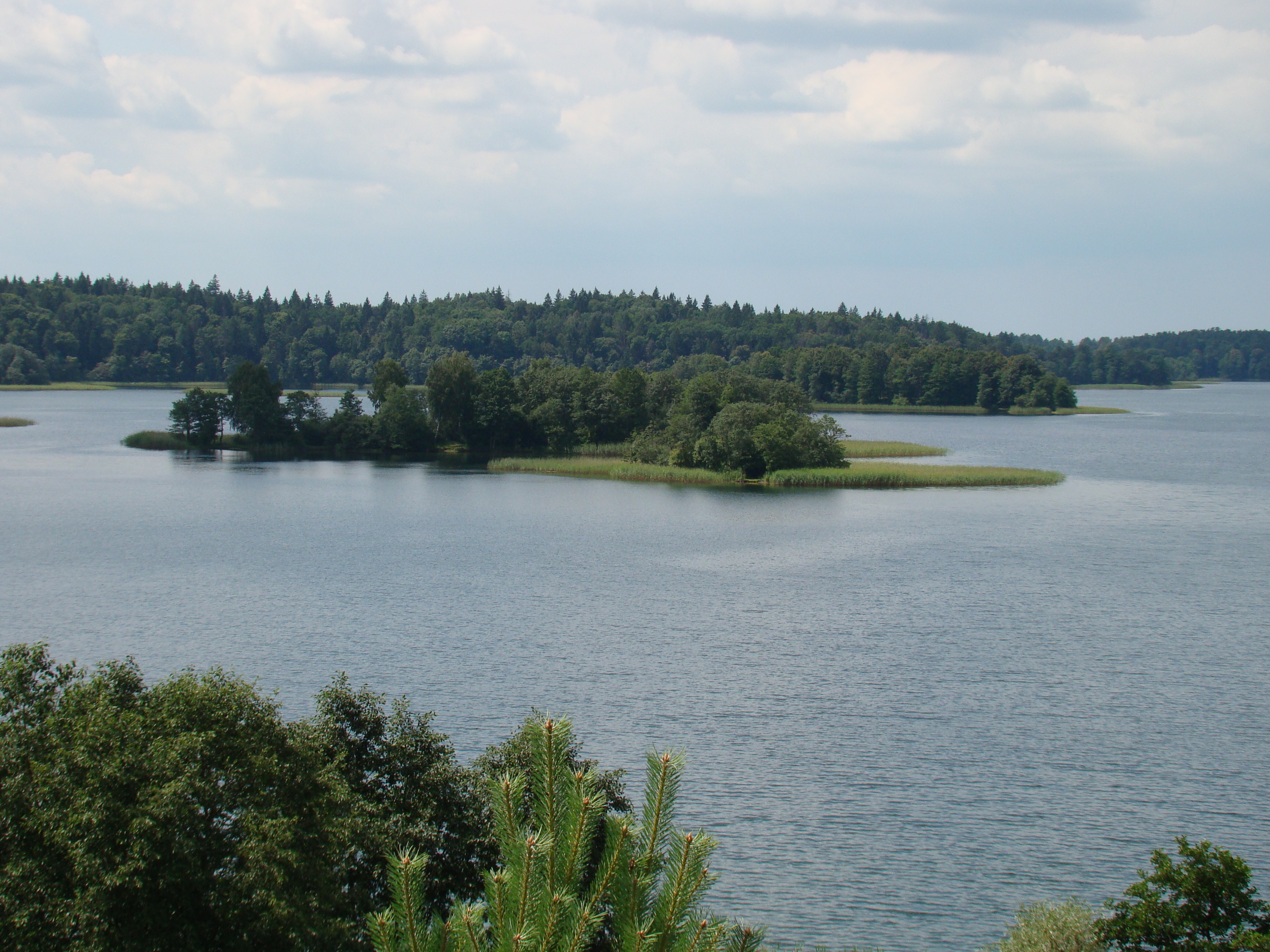 Trakų rajono Skaisčio ežeras